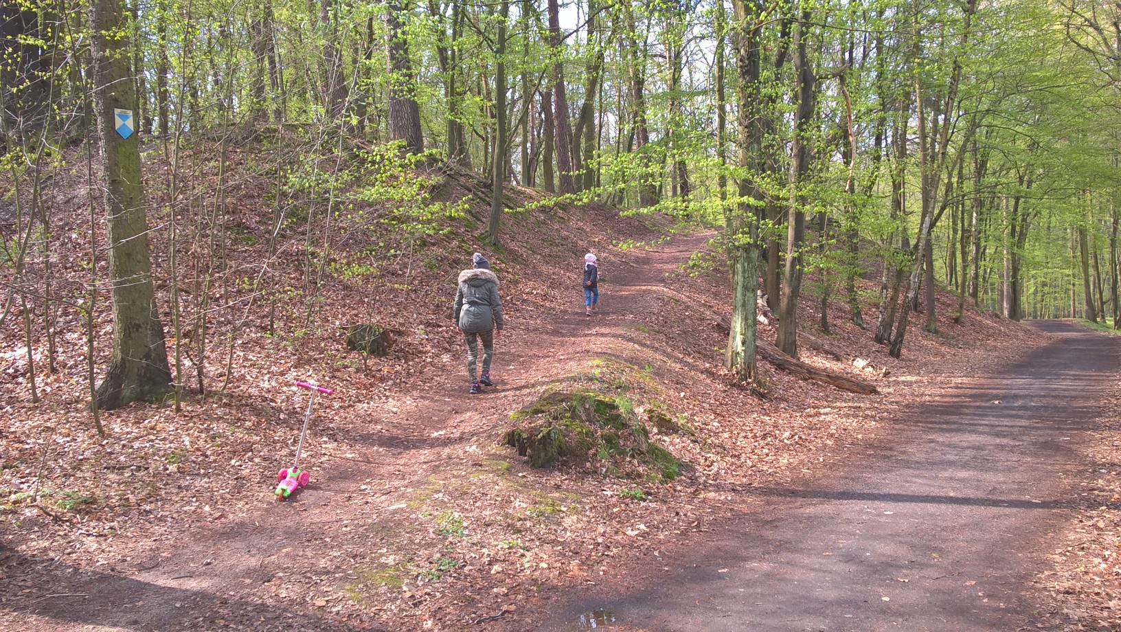 Północne wejście na Gród Chrobry w Szprotawie w Parku Słowiańskim